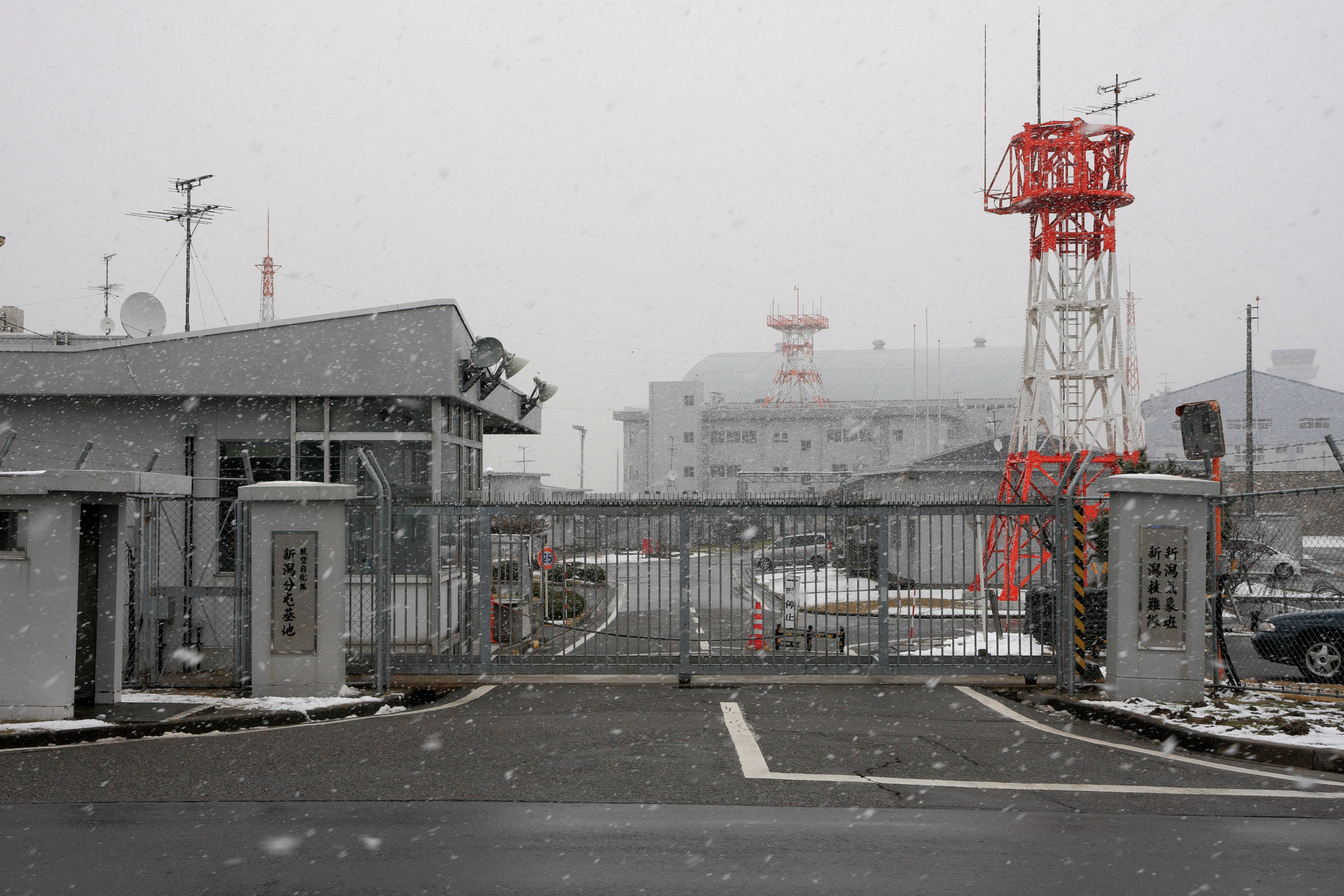 航空自衛隊新潟分屯基地の正門